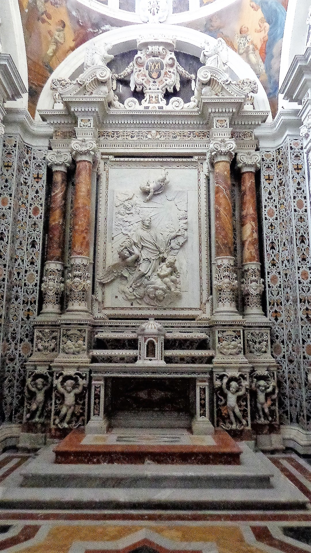 Interno chiesa